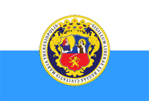 Flagge der Gemeinde Subotica und der Stadt Subotica